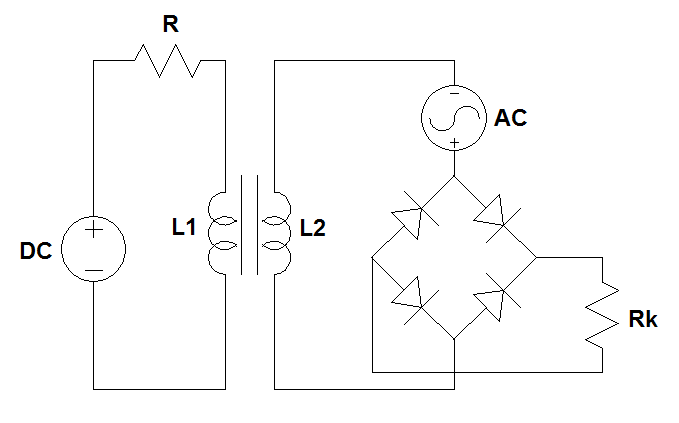 Dioodsillaga magnetvõimendi